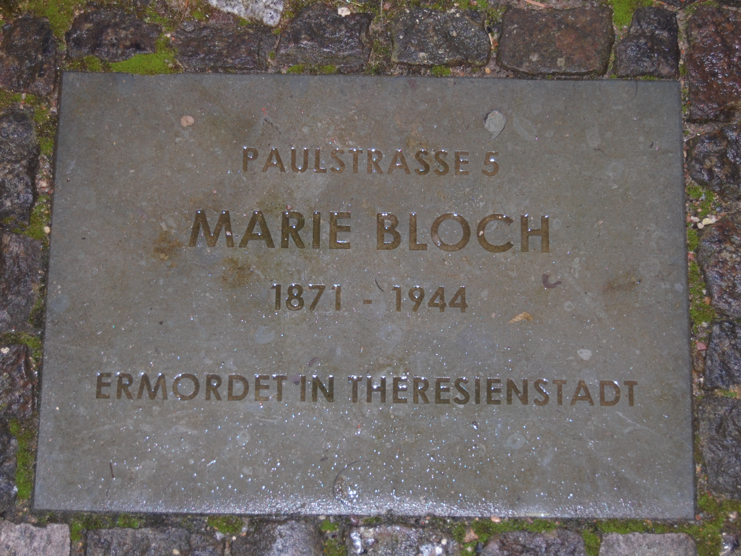 In der Paulstraße 5 in Rostock erinnert ein Denkstein an das Schicksal von Marie Bloch.